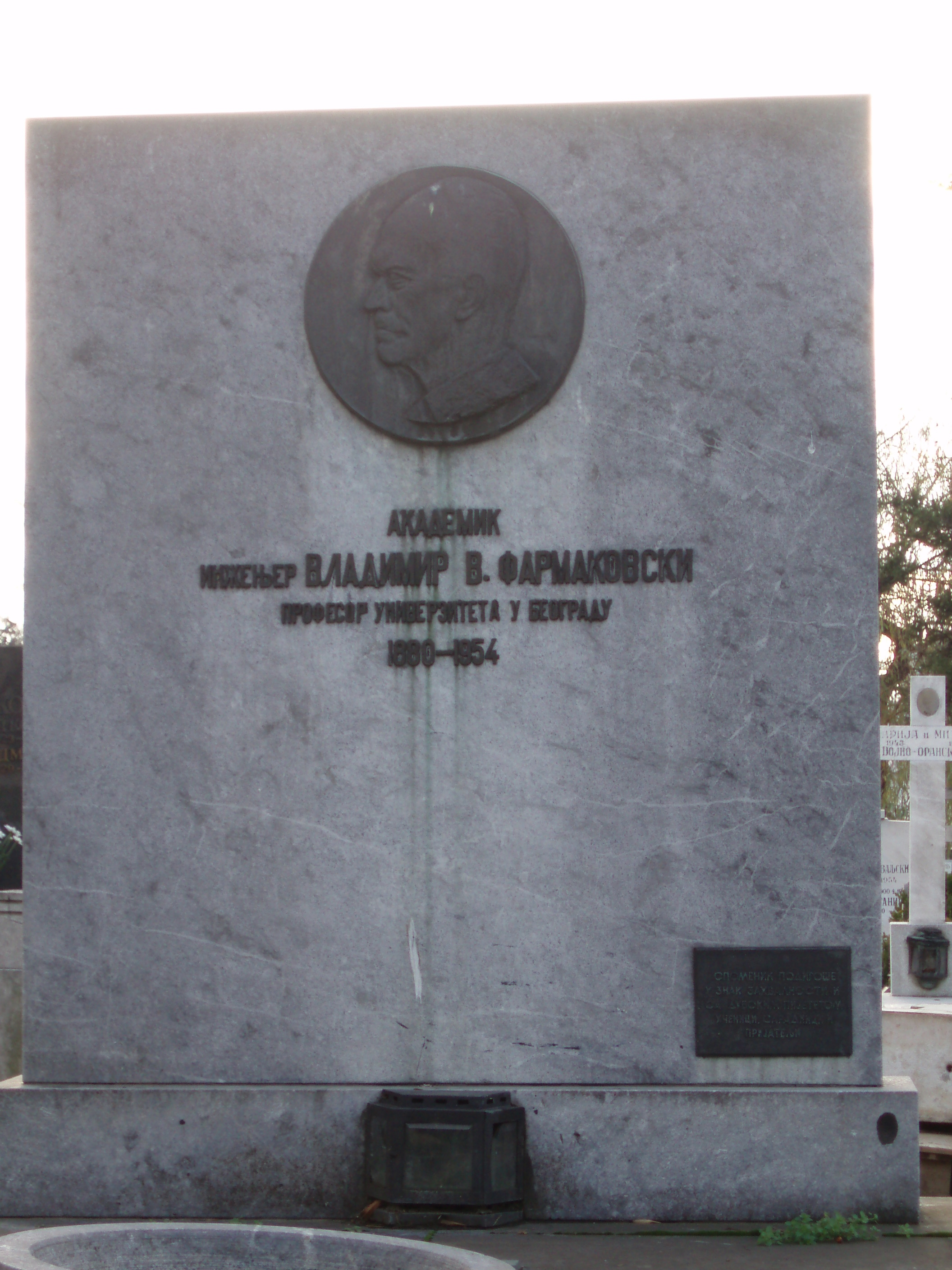 Надгробни споменик академика В. Фармаковског на Новом гробљу у Београду (аутор: Д .Ј. Басић)